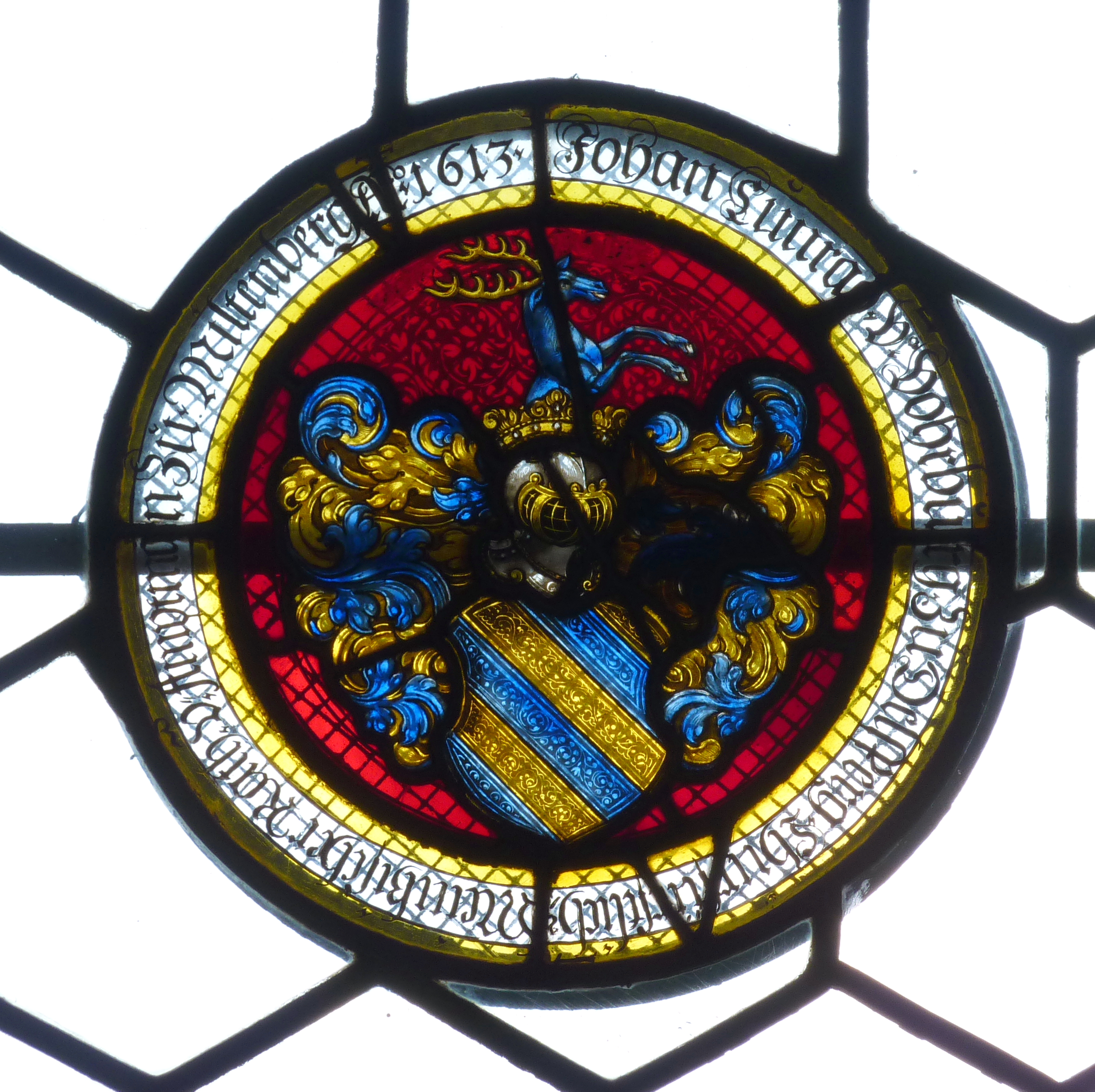 Rathaus in Bürgstadt im Landkreis Miltenberg (Bayern, Deutschland), Wappenscheibe im Sitzungssaal für Johann Conrad von Vohrburg